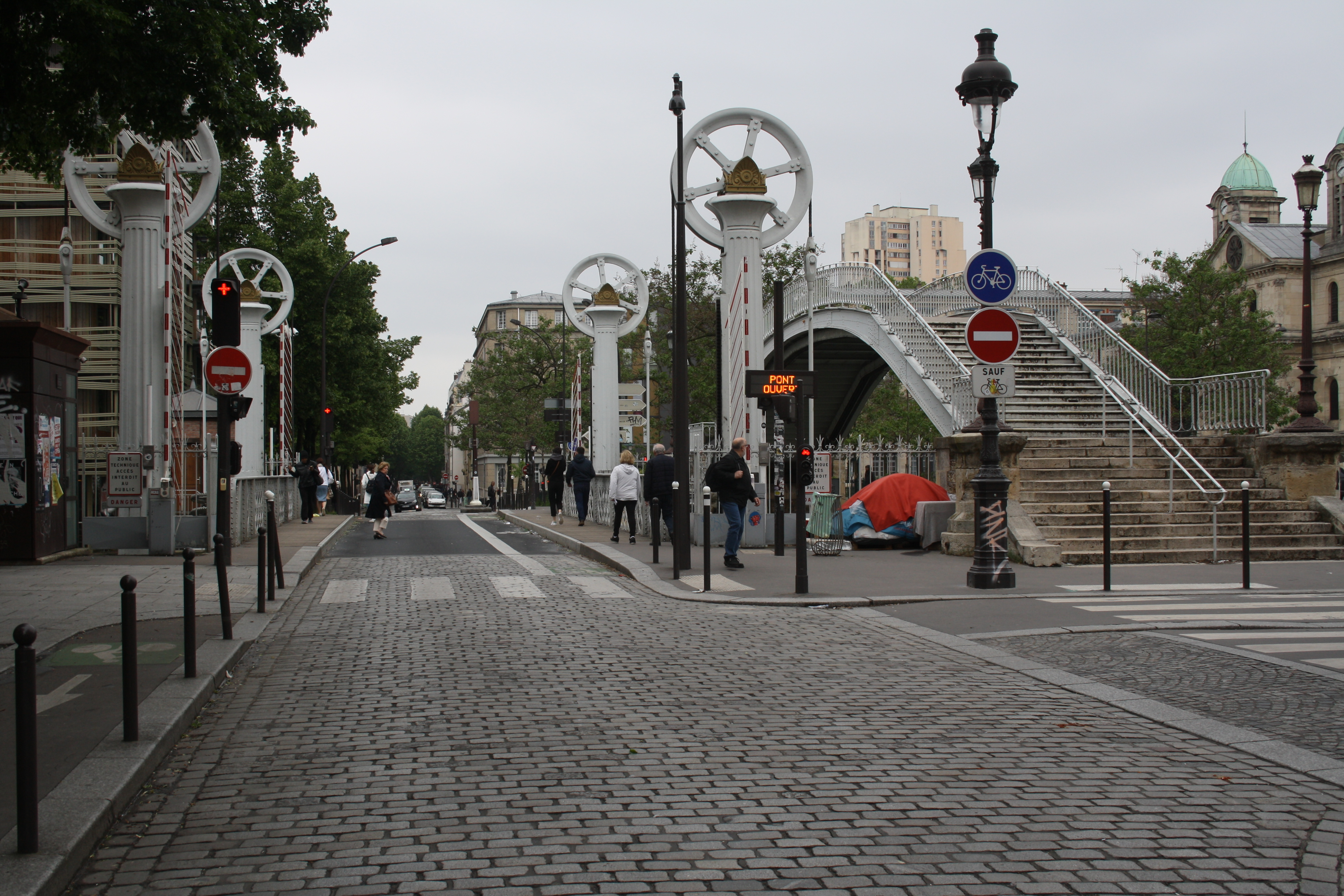 Hubbrücke Pont levant de la rue de Crimée in Paris